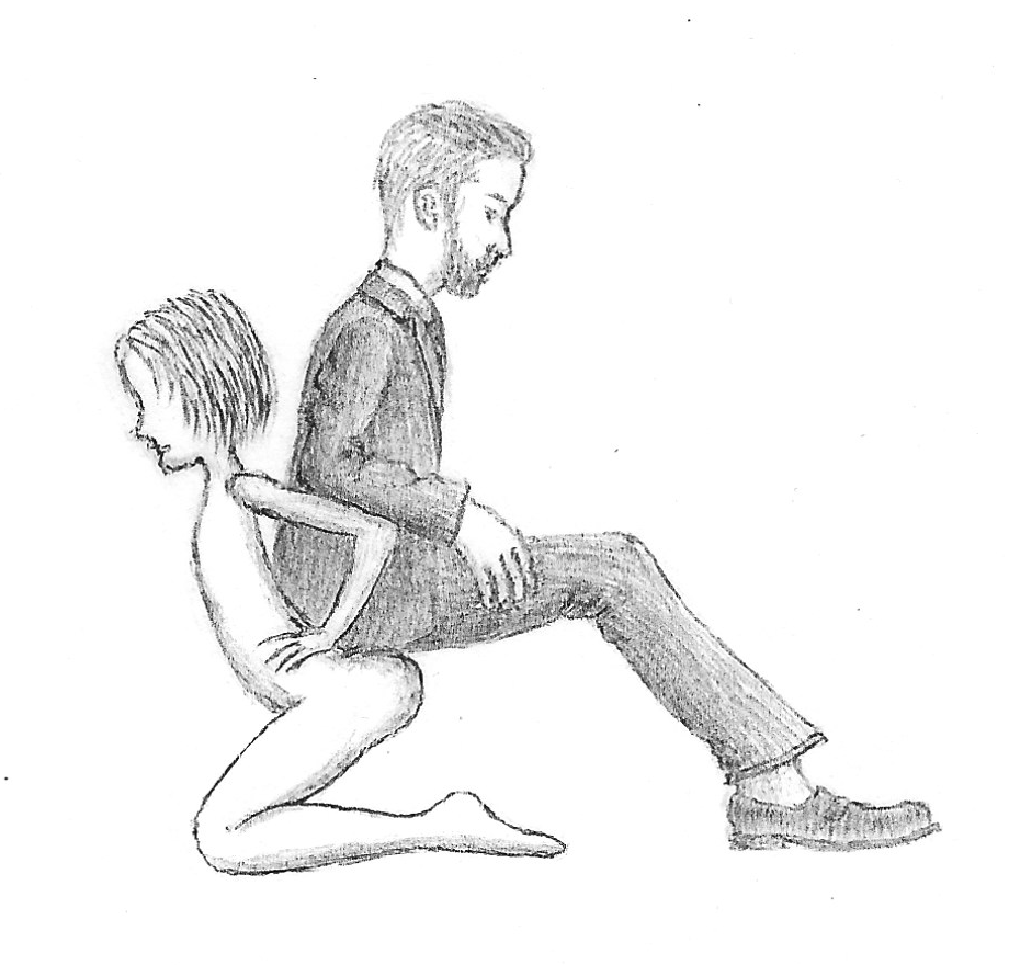 Forniphilie, meuble humain.